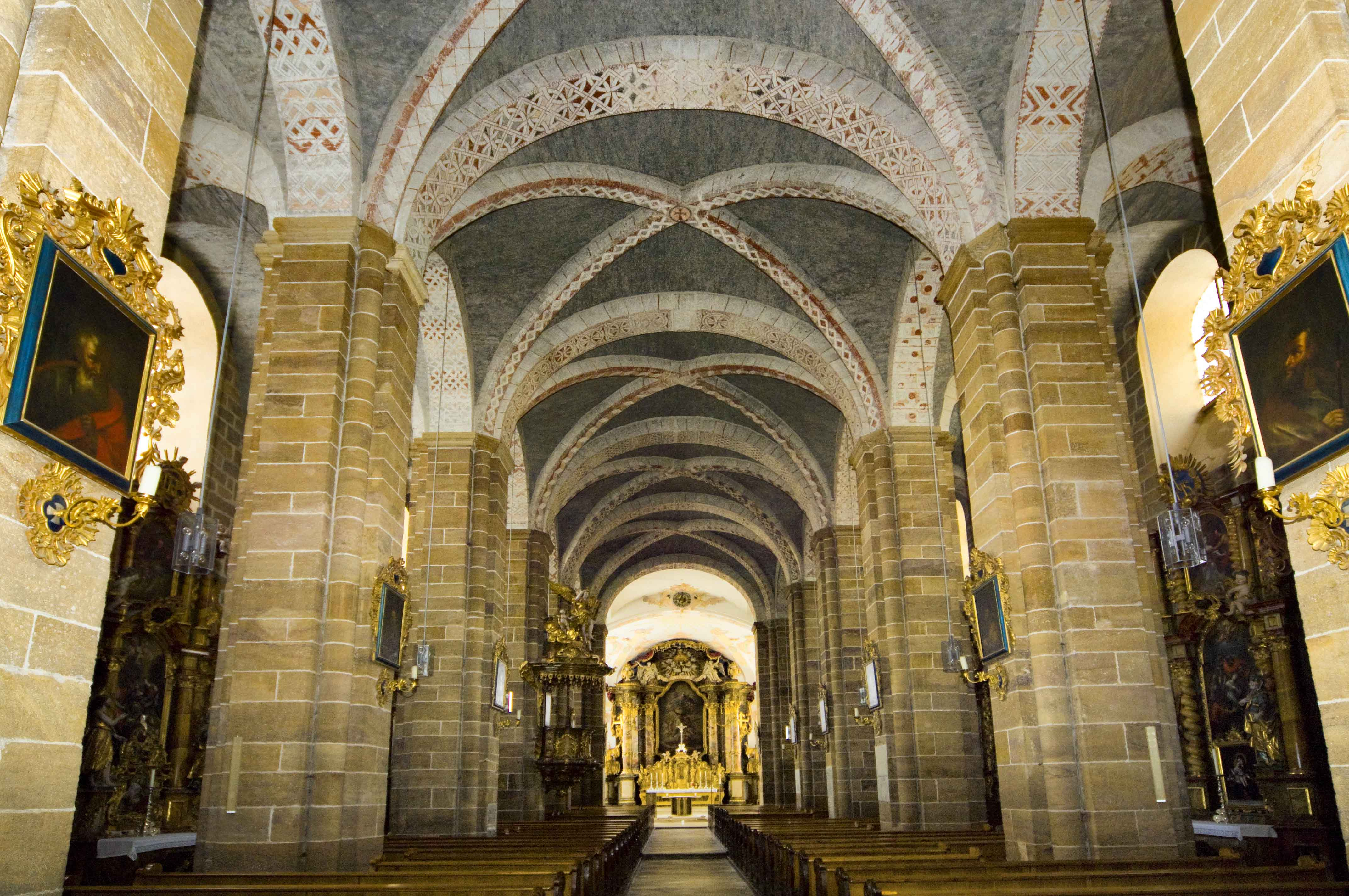 Kirchenansicht Kloster Walderbach, Bayern, Blick nach Osten